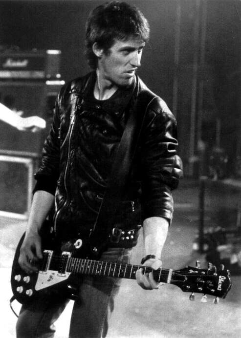 RIP, Donosti